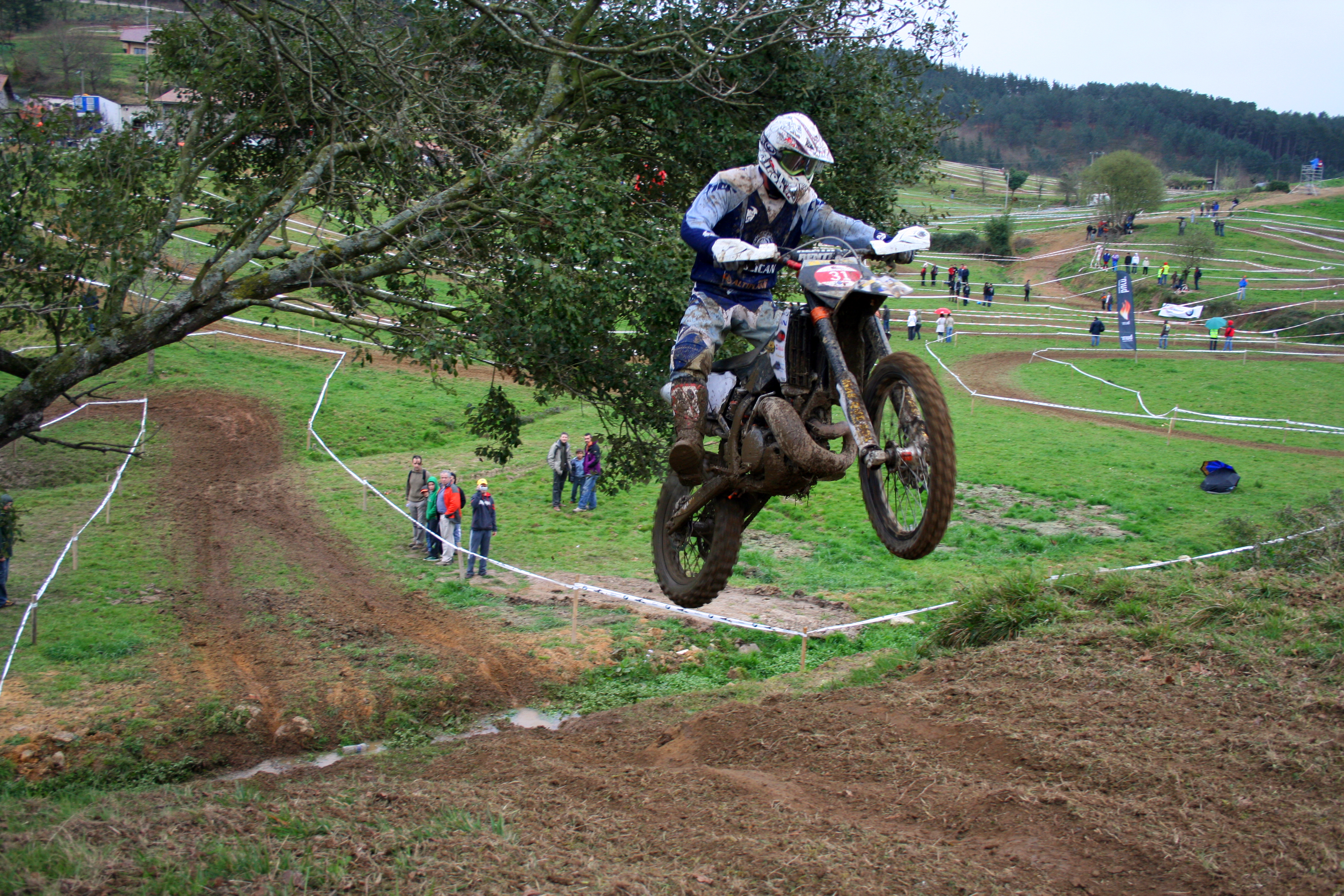 Ejemplo de moto de Enduro con motor de dos tiempos. Foto sacada en el Cross Country de Arratzu.